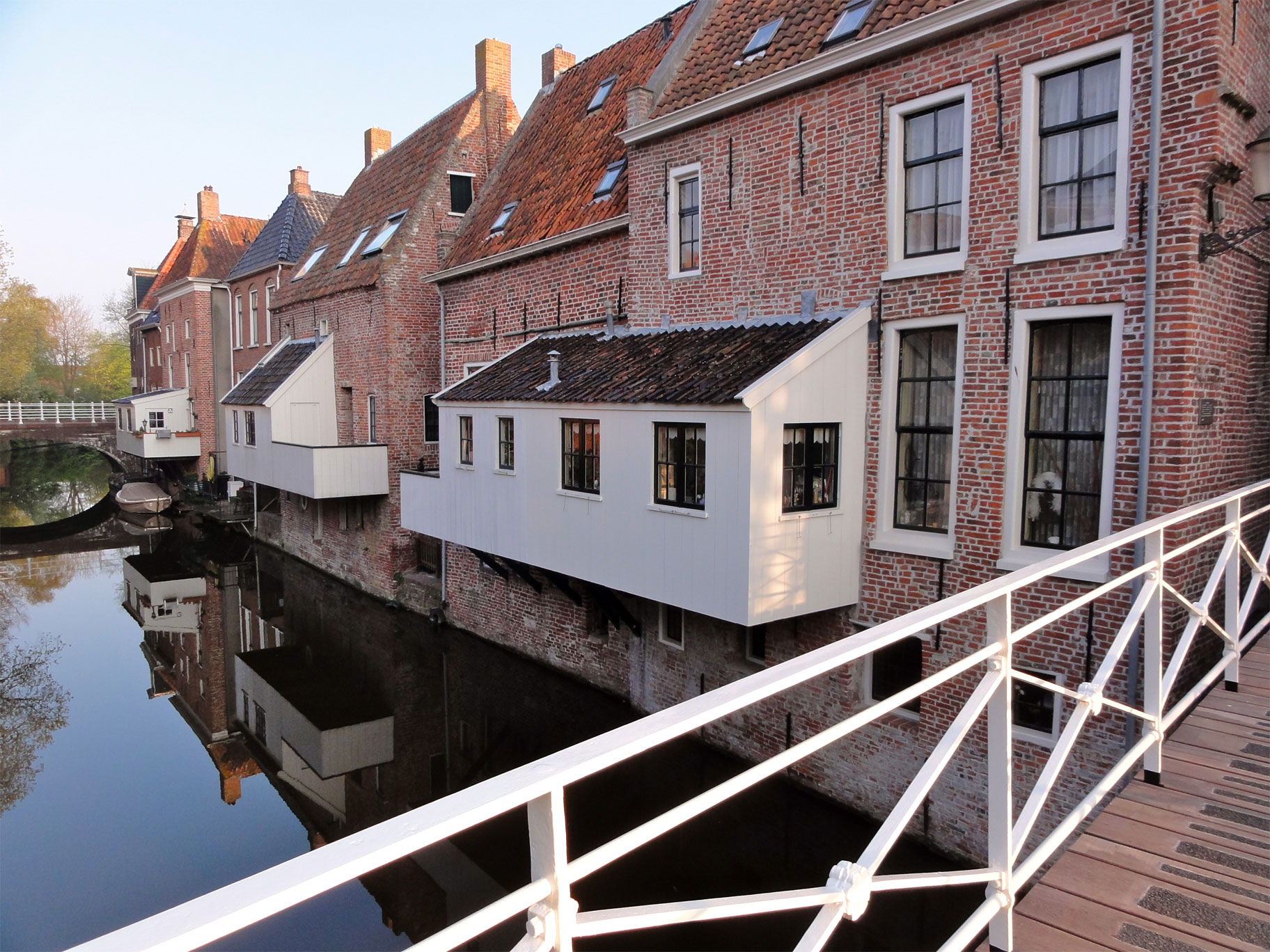 Hangende keukens aan de achterzijde van de Solwerderstraat 4, 10, 12 en 14 in Appingedam